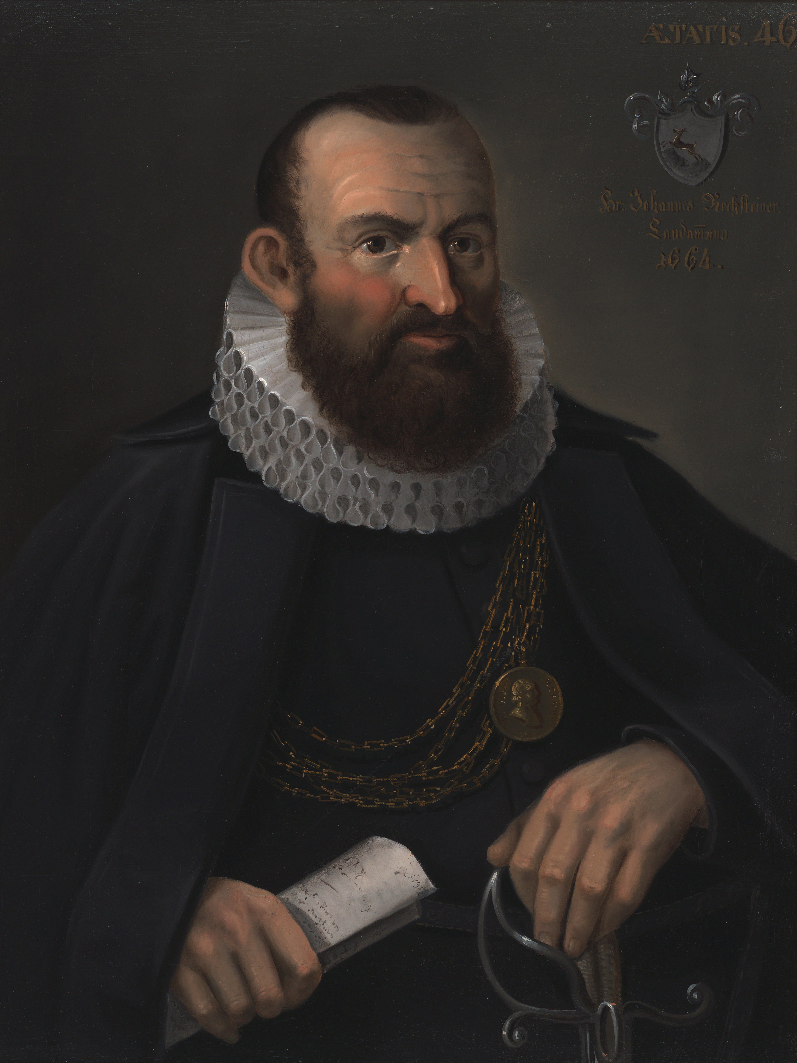 9. Landammann von Appenzell Ausserrhoden, Brustbildnis